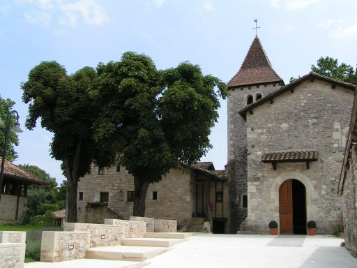 Photo de la place de l'église de Cayriech